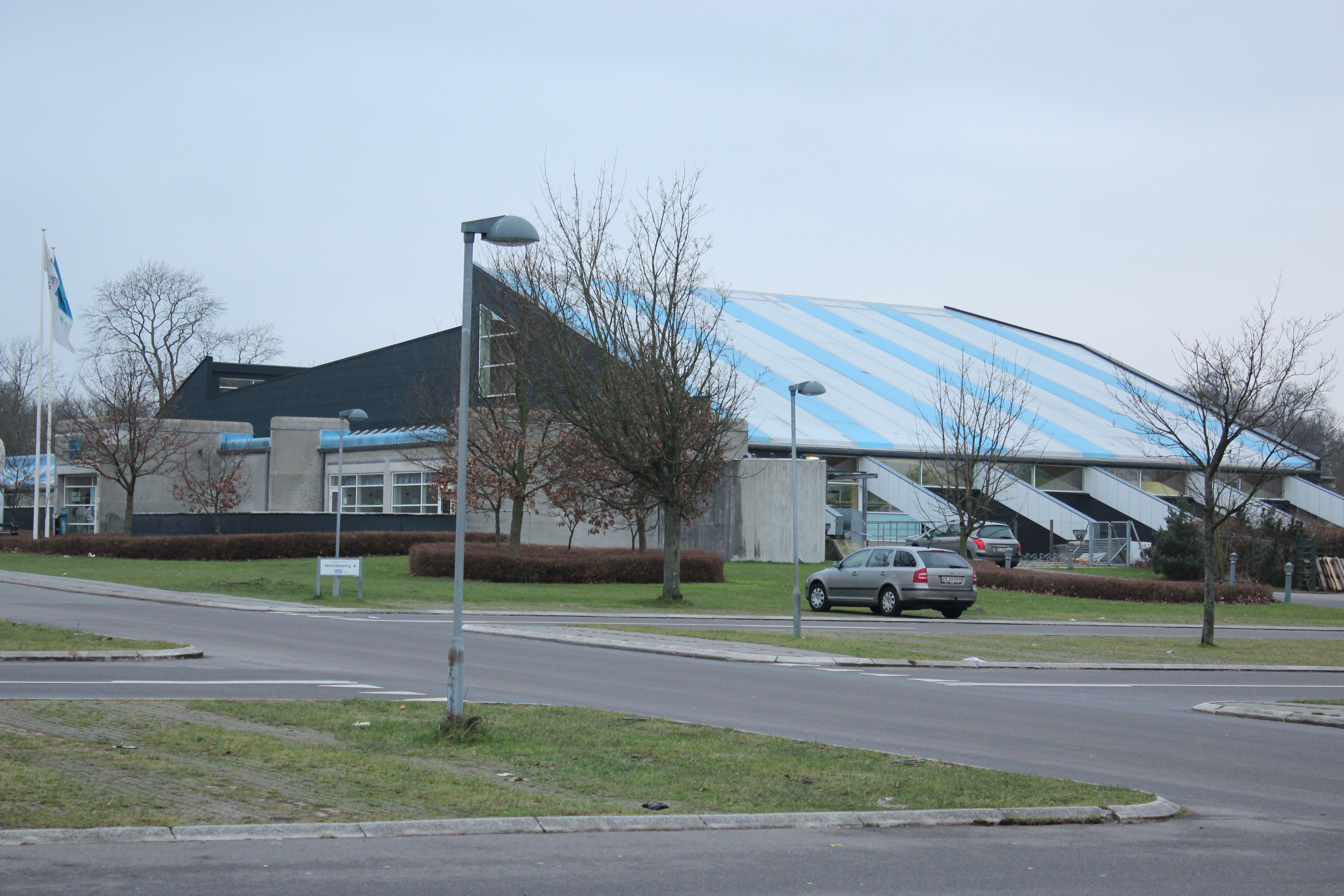 SvømmeCenter Falster i Nykøbing Falster.